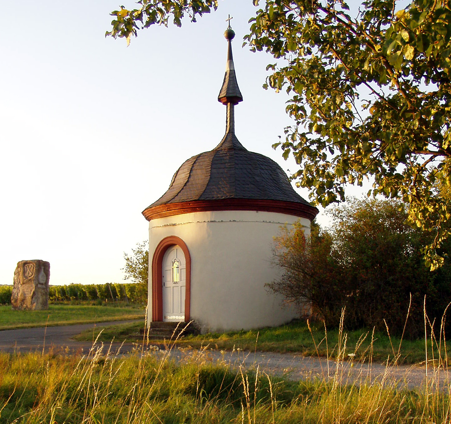 Die Rundkapelle im Weingarten von Fahr / Main